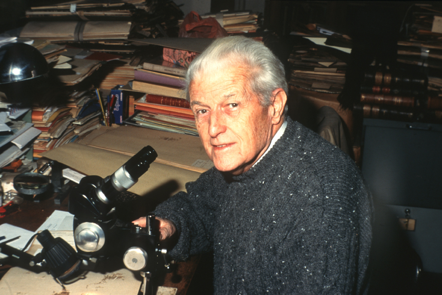 Photo de Jean Bosser par Marcel Lecoufle au Muséum d'Histoire Naturel de Paris